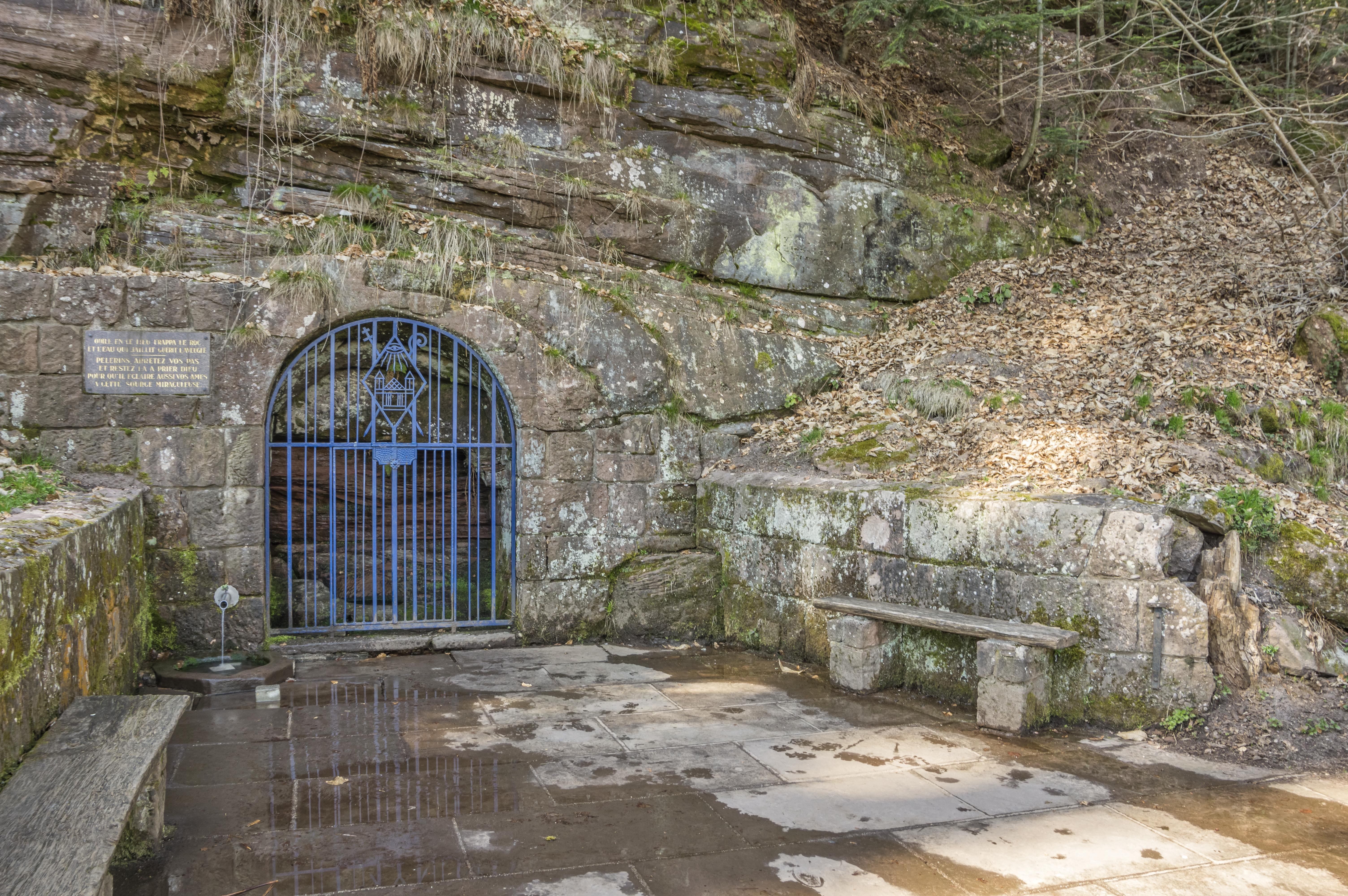 Bilder vom Le Mont ste. Odile (Odilienberg im Elsaß) Blick auf den Bereich vor der Quelle